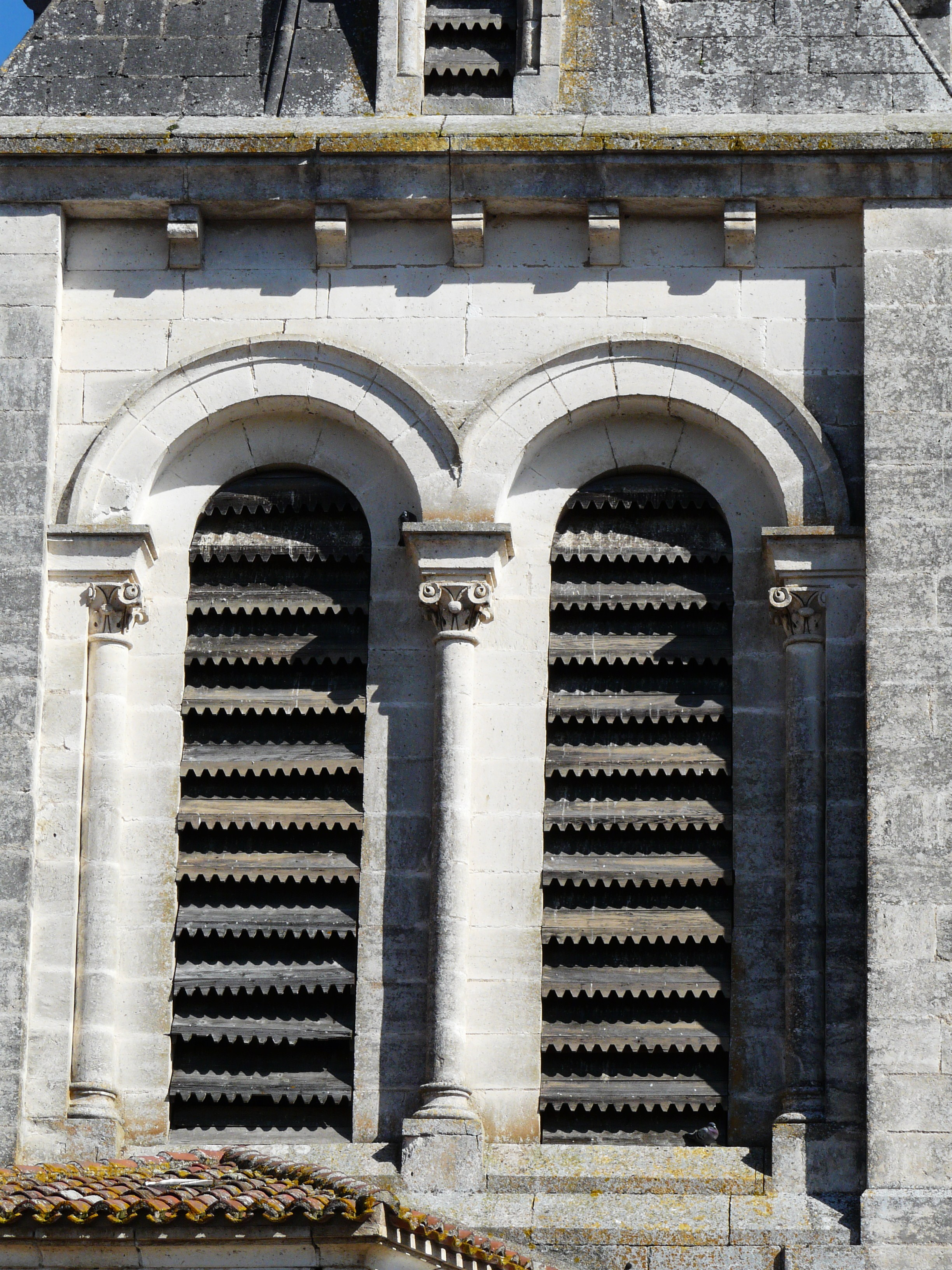 Les abat-sons du clocher, église Invention de Saint-Étienne, Bassillac, Dordogne, France